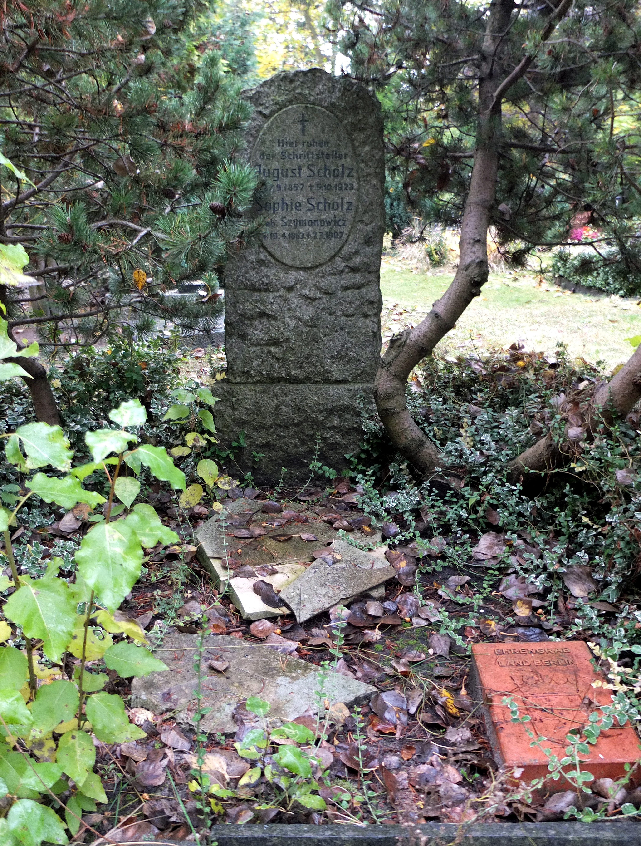 Grab von August Scholz auf dem Alten St.-Michael-Friedhof in Berlin-Neukölln.